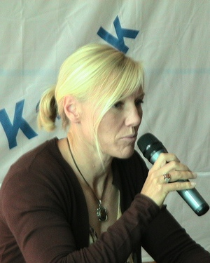 Immagine della canoista Josefa Idem